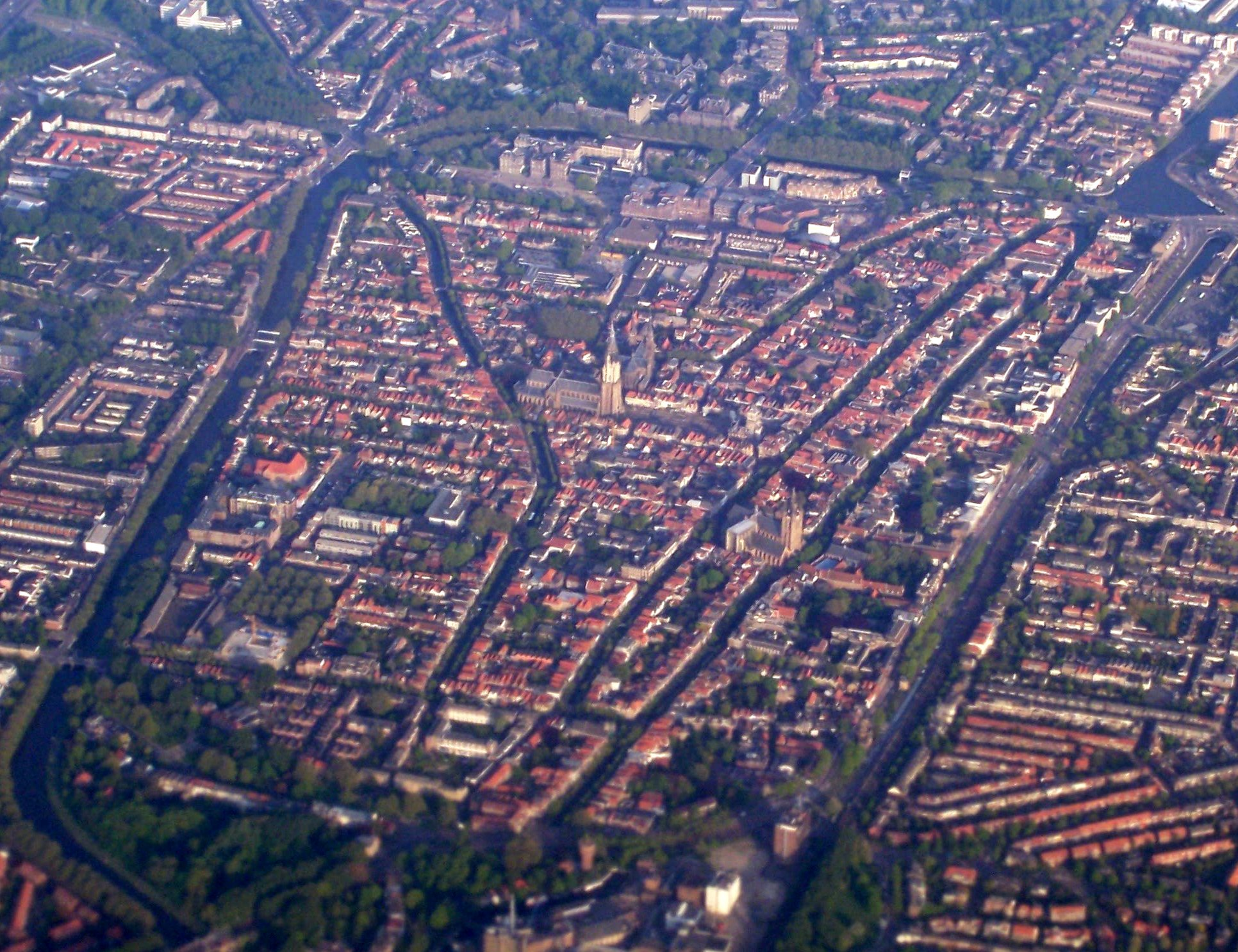 Delft